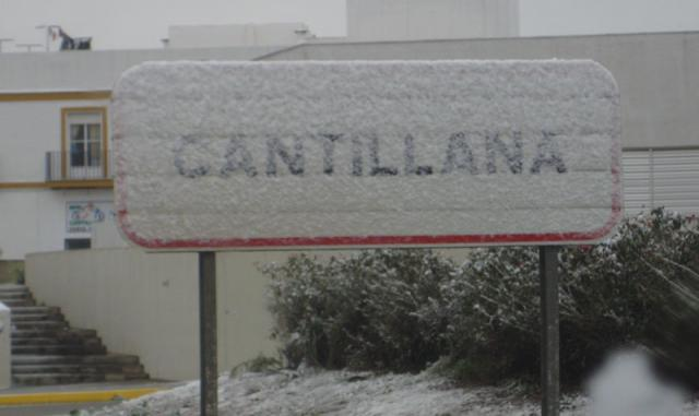 Cartel de cantillana nevado.